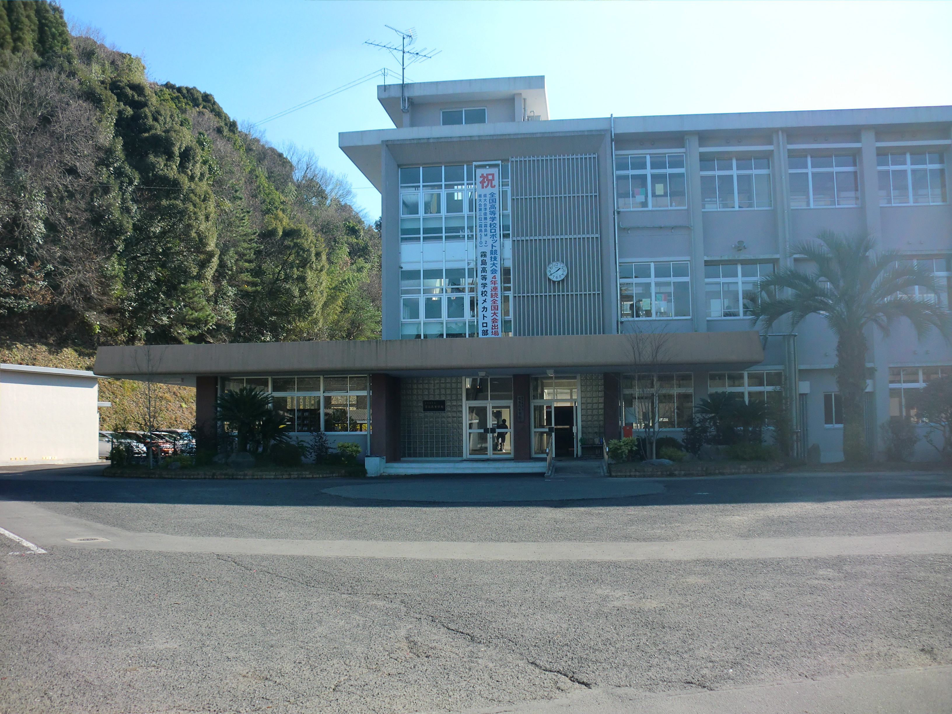 霧島市にある鹿児島県立霧島高等学校